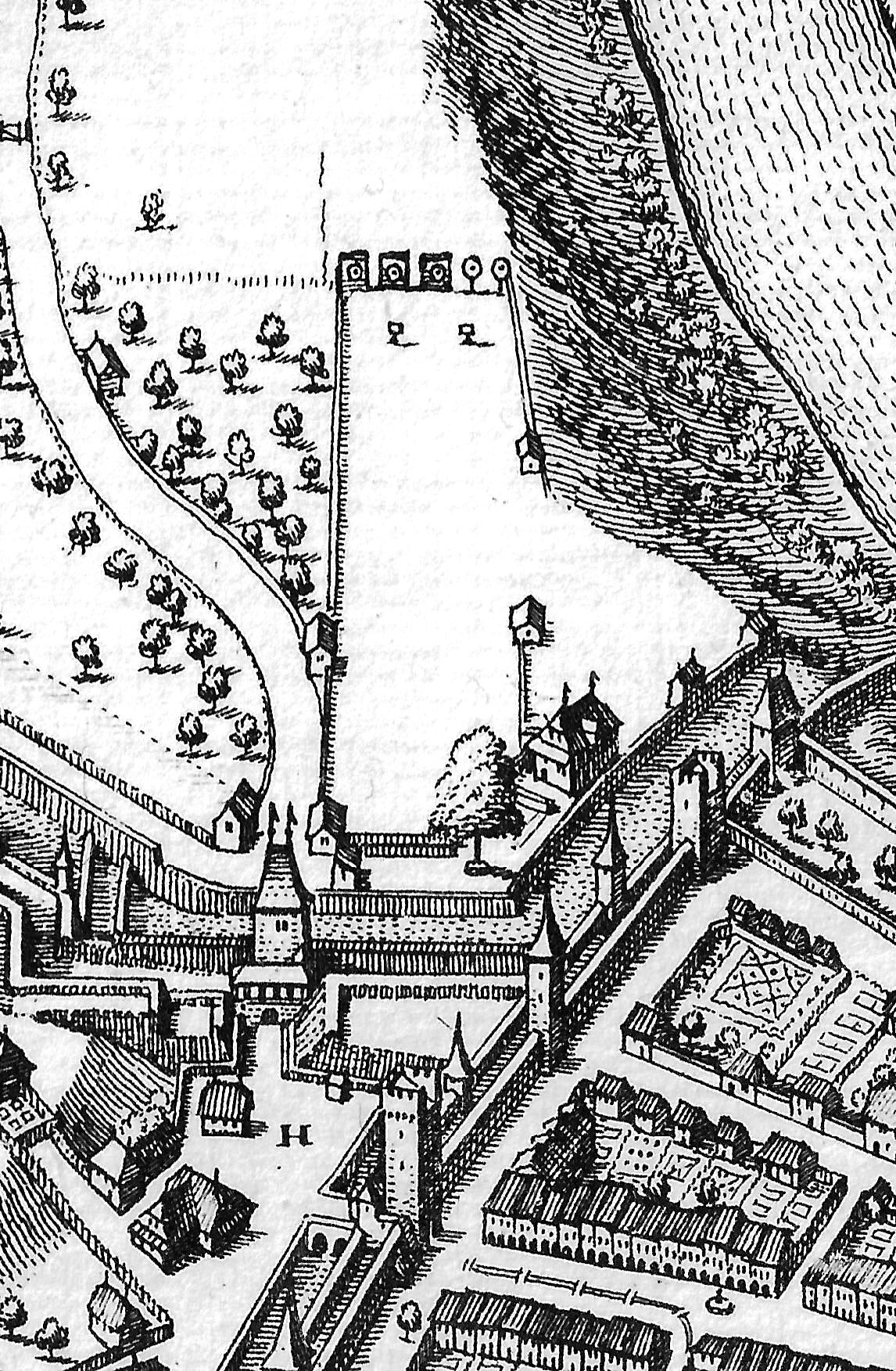 Merian, Bern, Schützenmatte.